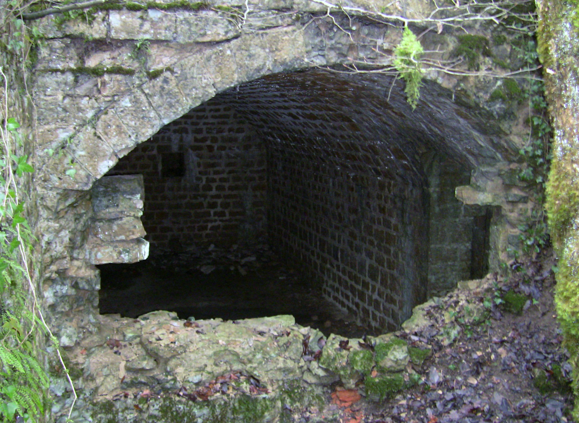 L'abris-caverne du fort de Planoise, à Besançon (Doubs, France).